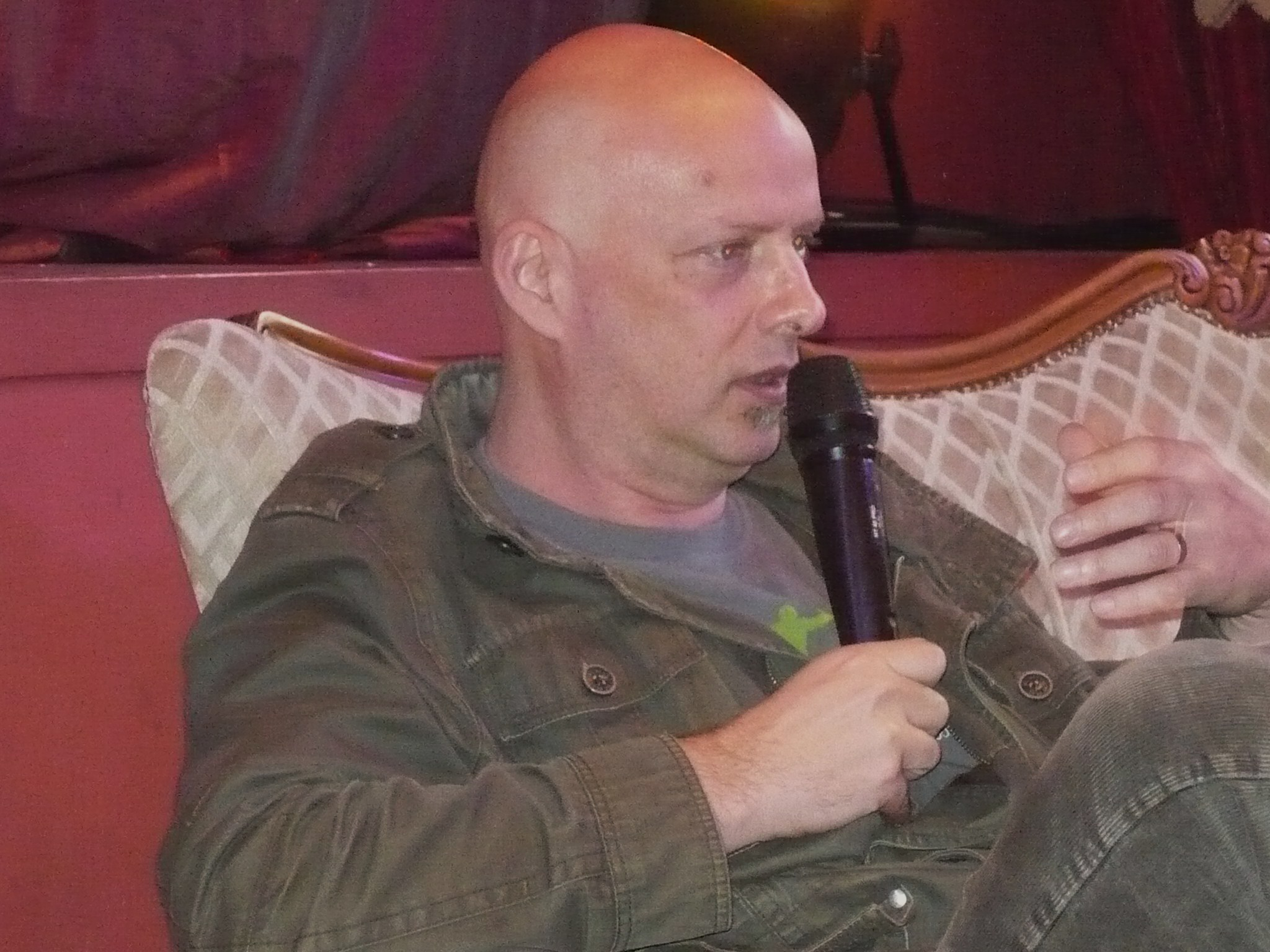 Hubert Klimko-Dobrzaniecki